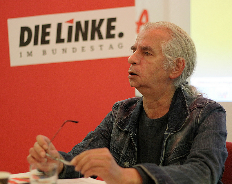 In Deutschland wird Atommüll unter fragwürdigen Bedingungen transportiert und gelagert. Jeden Tag können einem auf deutschen Straßen, Schienen und Wasserwegen Atomtransporte begegnen, doch nur über wenige wird berichtet. Atommüllstandorte in NRW sind das sogenannte Zwischenlager in Ahaus, die Uranfabrik in Gronau, die gewaltige Mengen Atommüll erzeugt. Allein in Gronau lagern 18.510 Tonnen hochgiftiges Uranhexafluorid unter freiem Himmel. Auch in der ehemaligen Atomforschungsanlage in Jülich lagern nach wie vor 152 hochradioaktive Castor-Behälter ohne ausreichende Genehmigung. Für die Endlagerung des ewig strahlenden Mülls werden nun neue Standorte gesucht. Gorleben bleibt aber weiterhin für ein solches Atommülllager im Rennen. Die Bundesregierung will 152 Castoren aus Jülich mit abgebrannten Brennelementen in die USA verfrachten. Derweil versuchen sich die Betreiber der Anlagen mit einer Bundes-Stiftung (Bad-Bank), die den Betrieb der Atomkraftwerke übernehmen und für die Stilllegung und Atommülllagerung zuständig sein soll, aus der Verantwortung zu stehlen. Die Konzerne wollen nur einmalig 36 Mrd. Euro in diese Stiftung geben. Die weiteren enormen Kosten der künftigen Atommülllagerung sollen dann später die SteuerzahlerInnen zahlen. Wir wollen sie damit nicht ungestraft durchkommen lassen und berichten daher über die „Atommüll Tatorte“ in Deutschland. Mit Hubertus Zdebel (MdB DIE LINKE, Sprecher für Atomausstieg), Inge Höger (MdB DIE LINKE), Andrej Hunko (MdB DIE LINKE) Peter Dickel (AG Schacht Konrad)